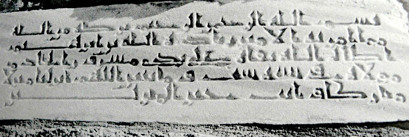 Gründungsinschrift des Ribats in Sousse, Tunesien